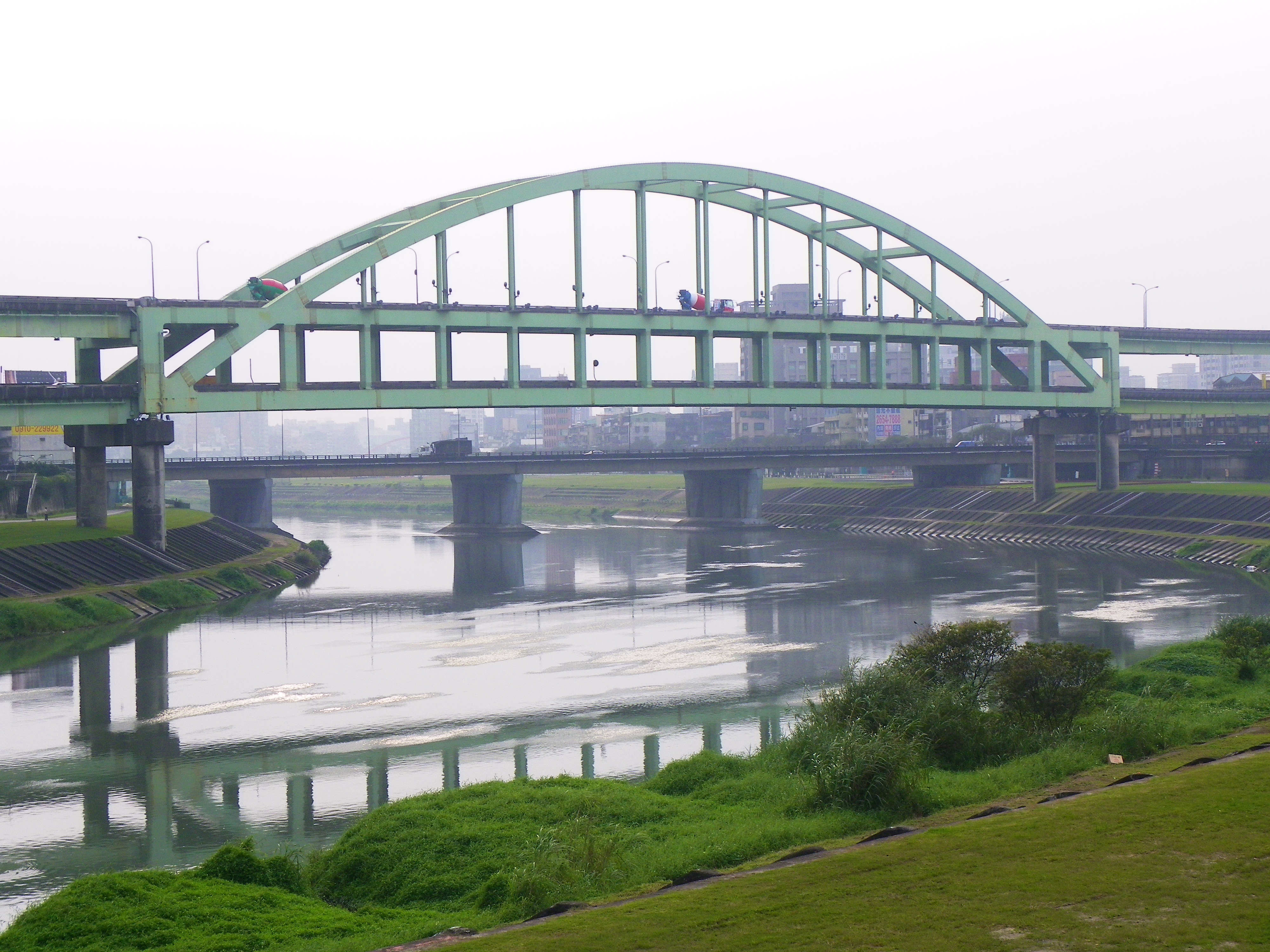 中文（台灣）: 臺北市環東大道跨基隆河的環東大橋遠景，攝於內湖區安美街河堤堤頂，後方是成功橋。